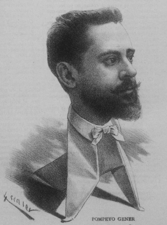 Pompeyo Gener, caricaturizado por Ramon Escaler